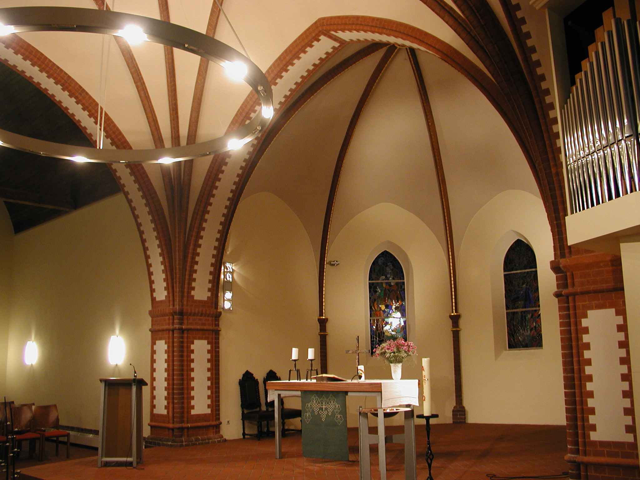 Dorfkirche Weißensee